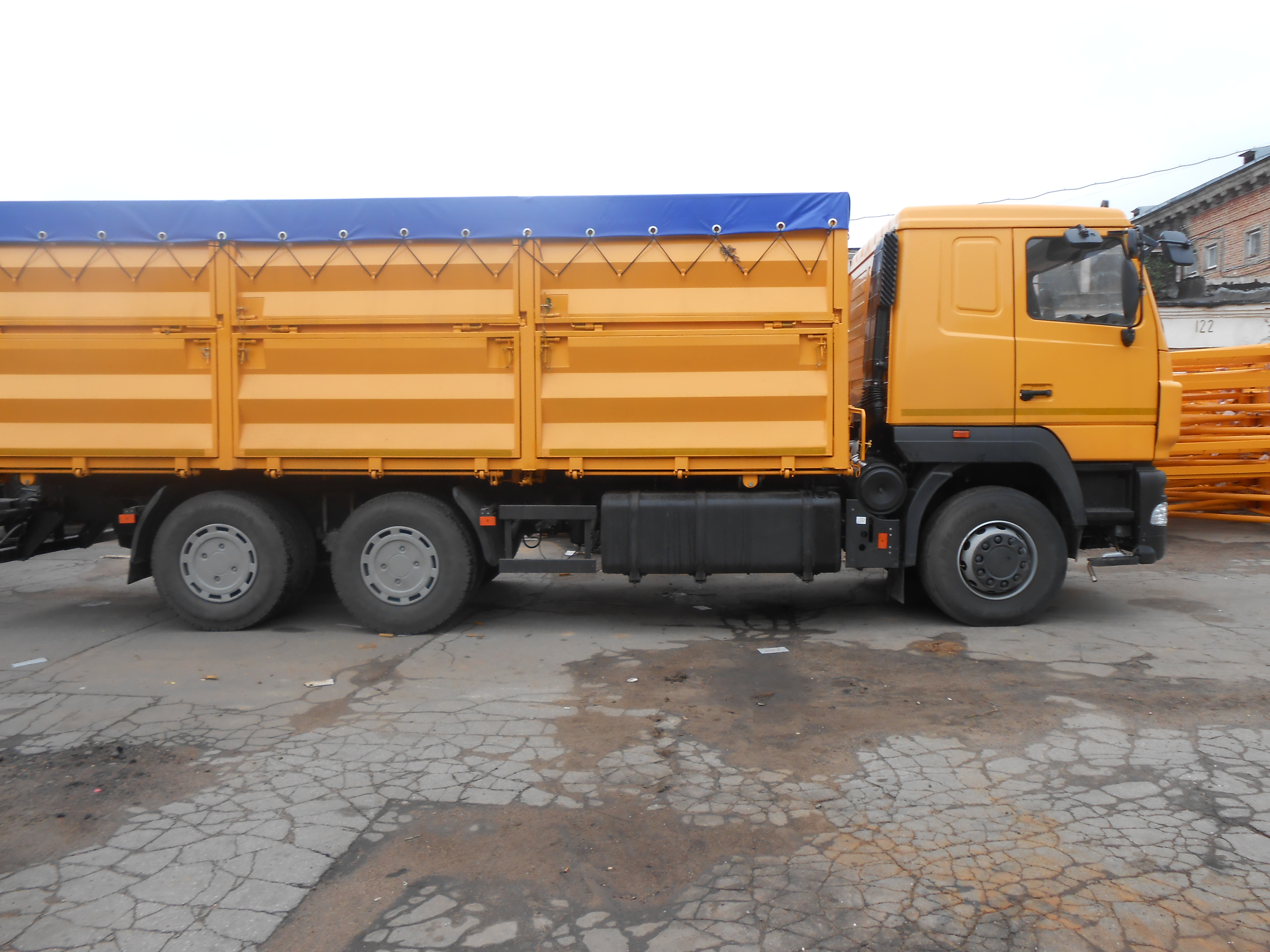 Зерновоз МАЗ 6501А8-325-000